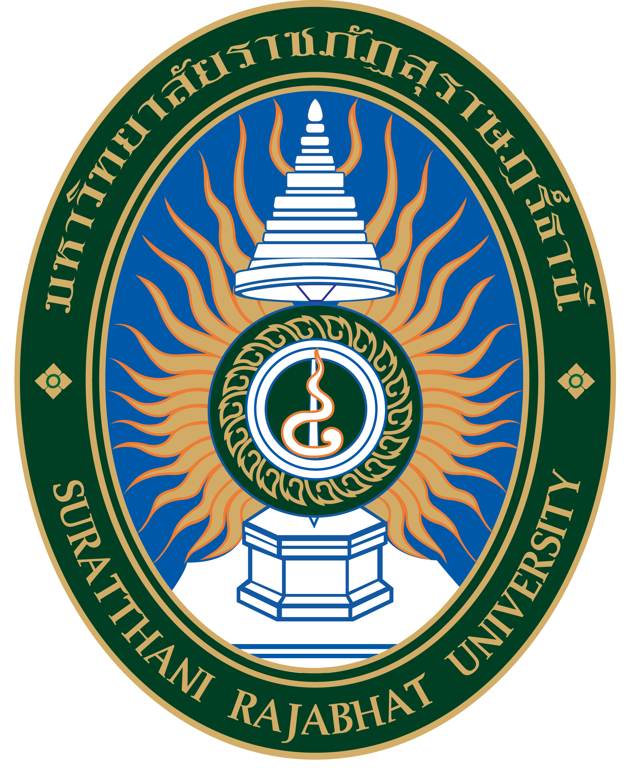 ตราสัญลักษณ์ประจำมหาวิทยาลัยราชภัฏสุราษฎร์ธานี